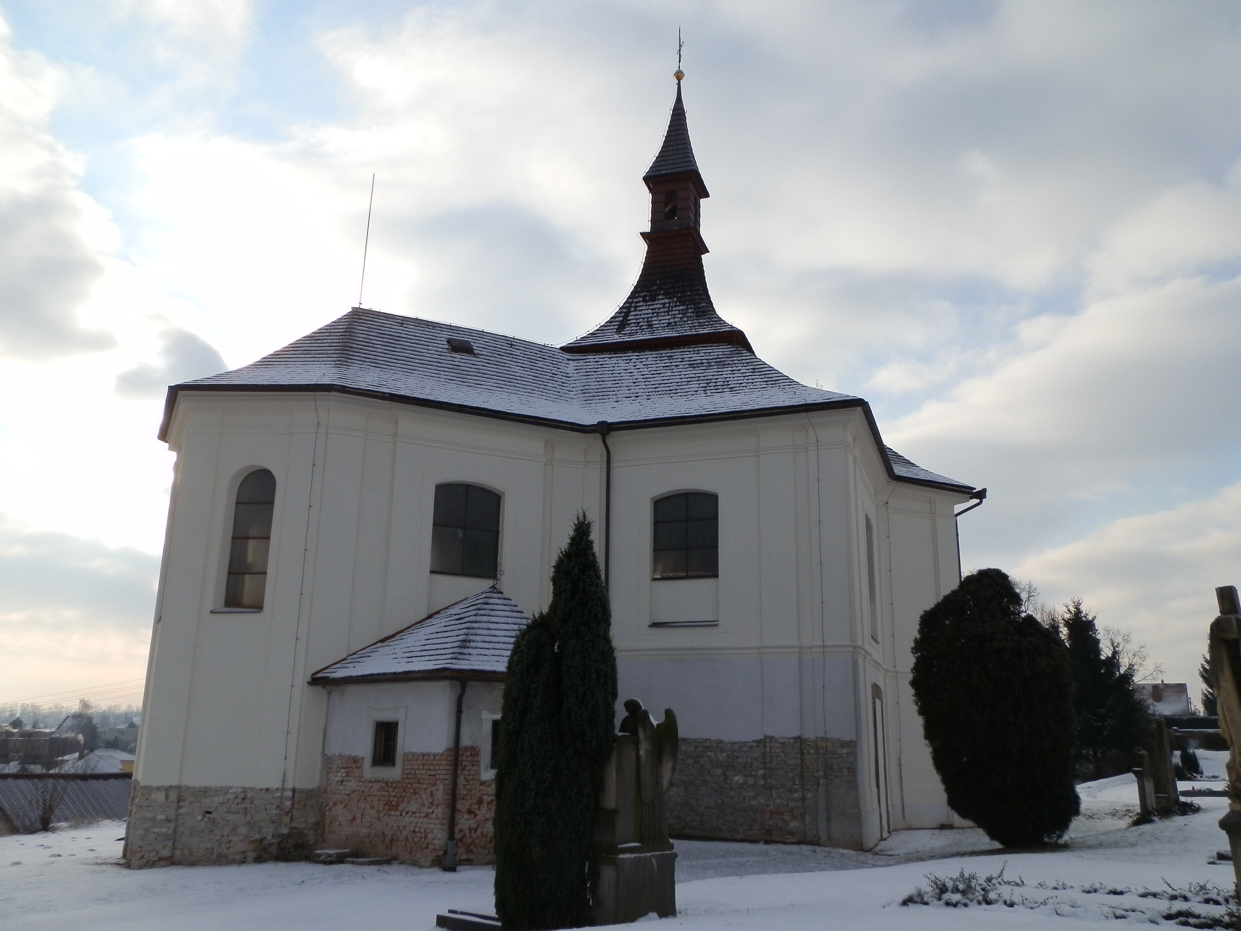 Kostel sv. Martina, Chrašice, pohled od severu